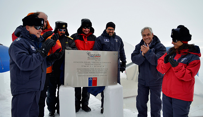 El Presidente Sebastián Piñera inaugura la Estación Polar Científica Conjunta "Glaciar Unión" en el Territorio Chileno Antártico.